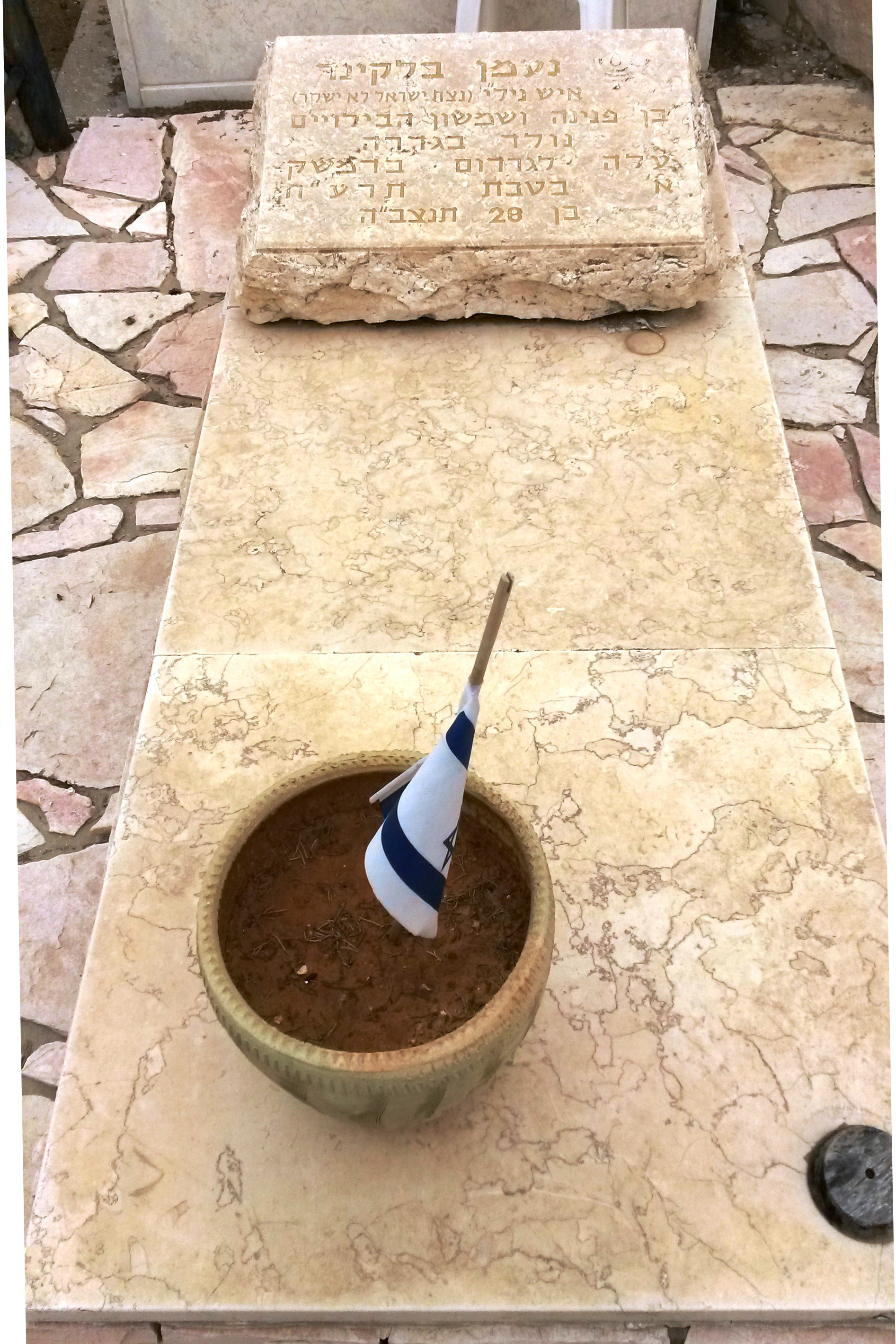 קבר עולה הגרדום נעמן בלקינד בבית העלמין "גני אסתר" בראשון לציון